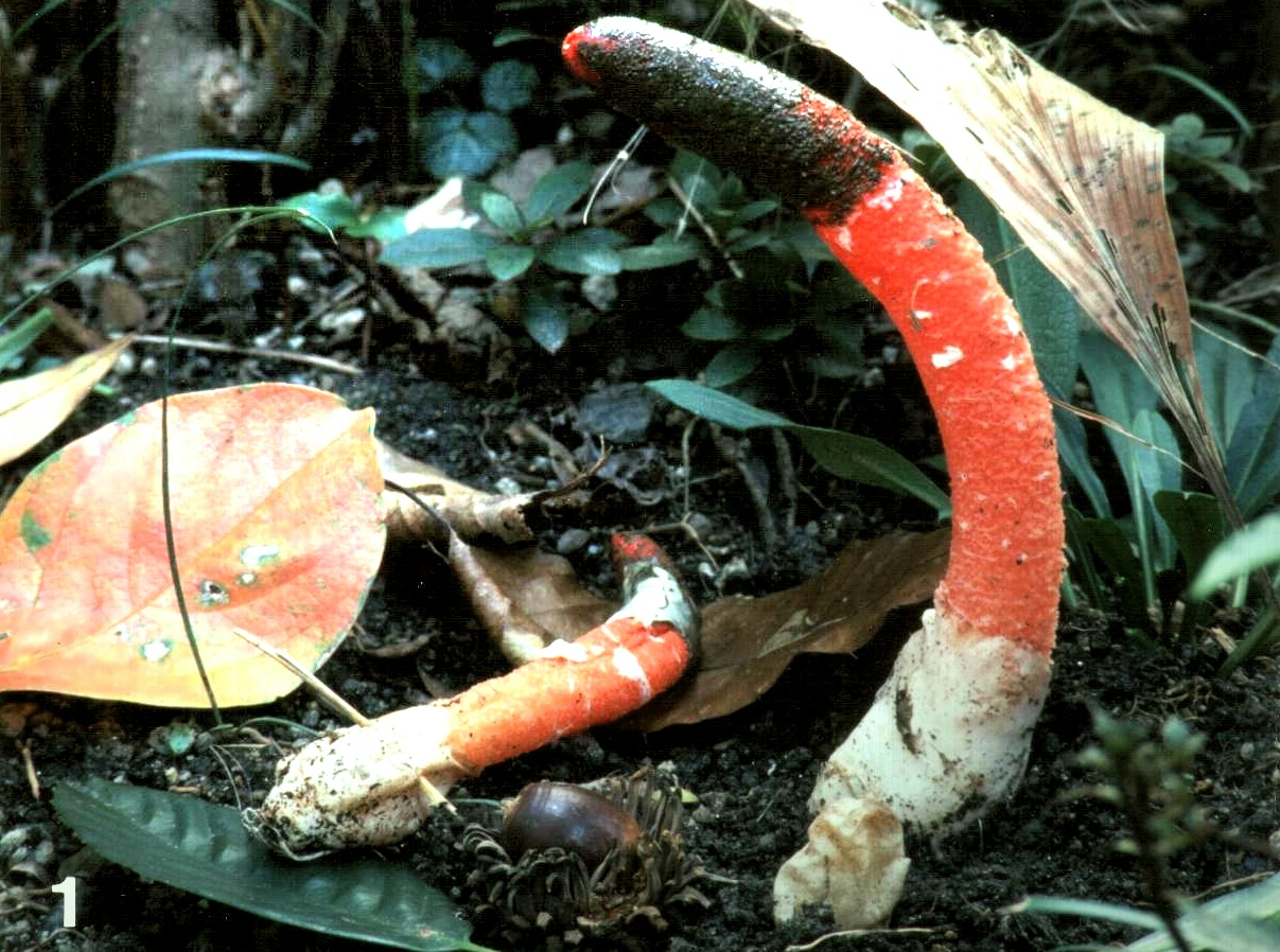 Champignon gastéromycète. Photo des specimens (type) de la première récolte japonaise. Nom scientifique : Mutinus elegans (Montagne) Ed. Fischer (1888), in Saccardo, Sylloge Fungorum 7 (1) :13 Nom français : Satyre élégant Nom japonais : Tanuki-no-beni-efude (タヌキノベニエフデ, 狸紅絵筆), Guez D. et Nagasawa E. (2000), Trans. mycol. Soc. Japan 41 p.75-78